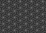 CG